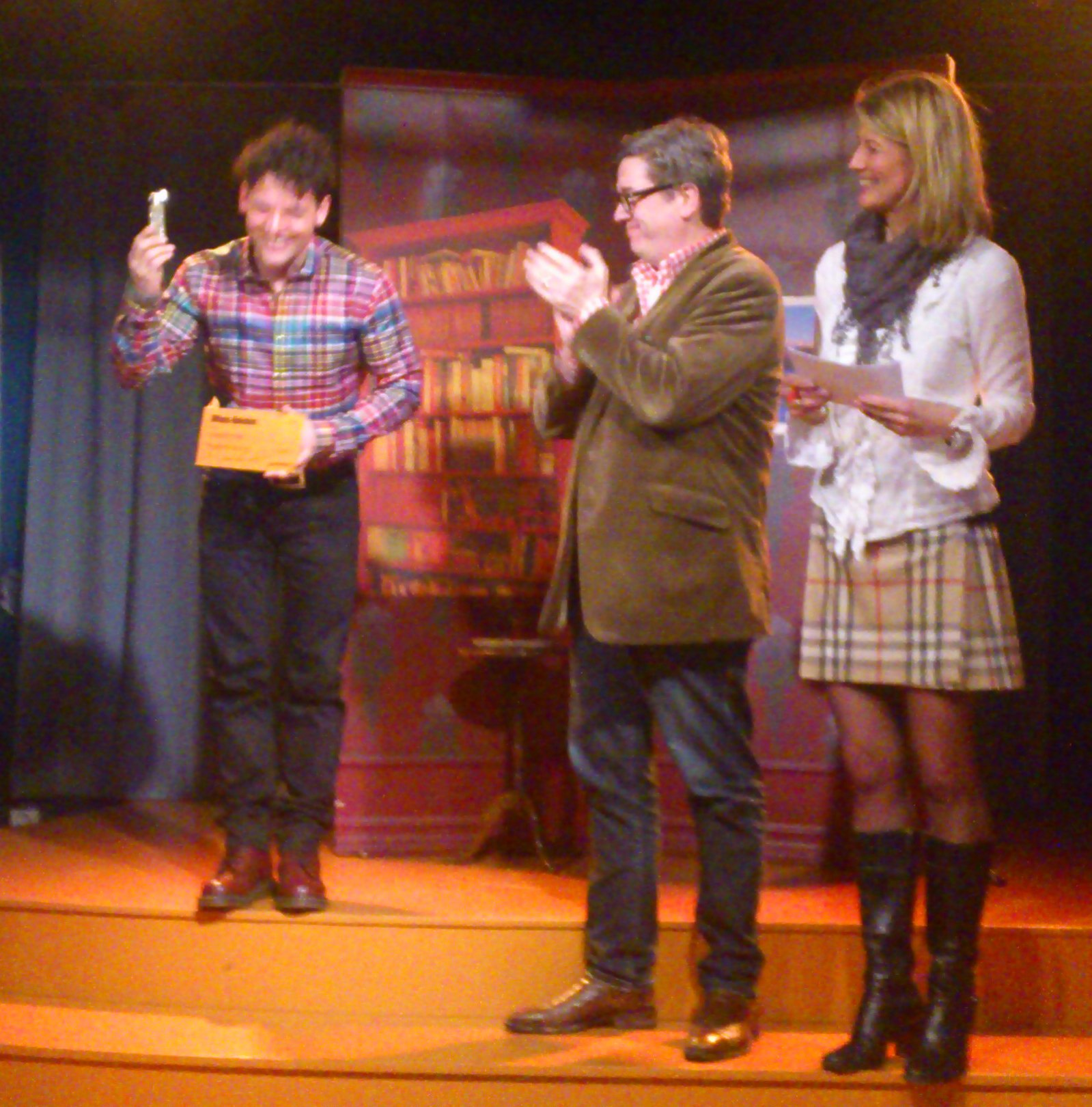 2013-04-17 Nassim Al Fakir mottar Alfons-Bokalen